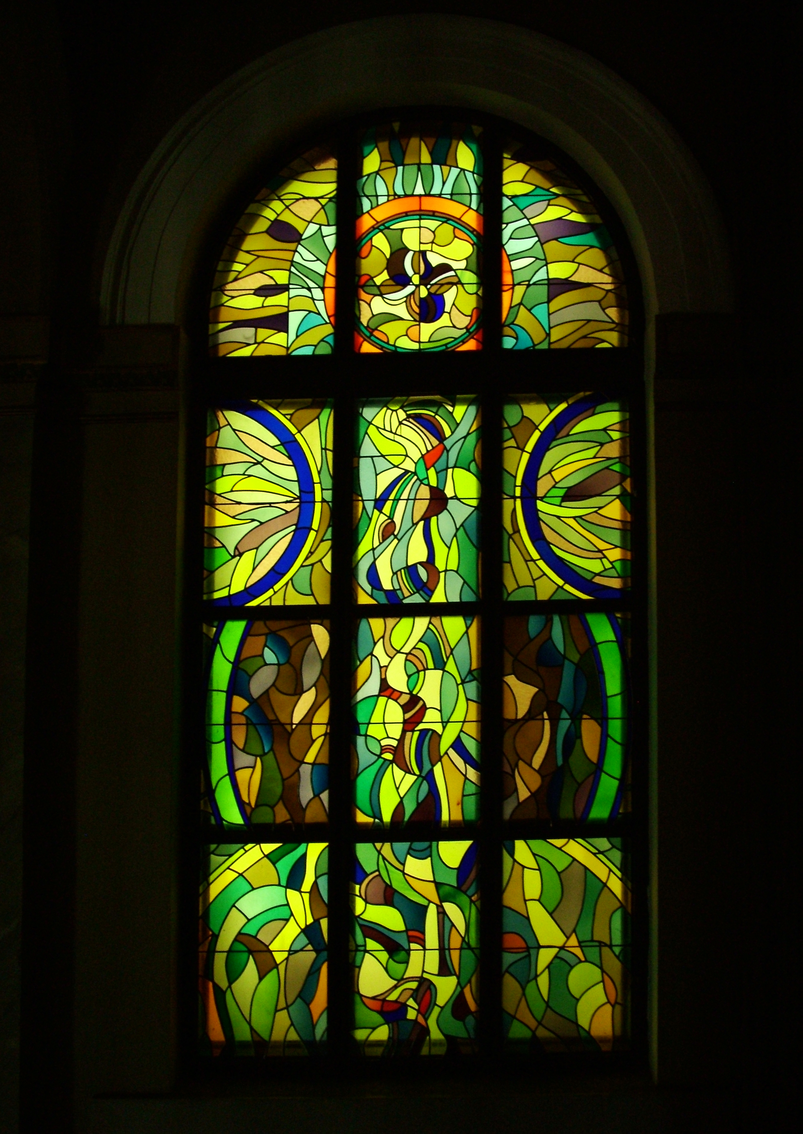 Veszprémi megyeház: lépcsőházi üvegmozaik